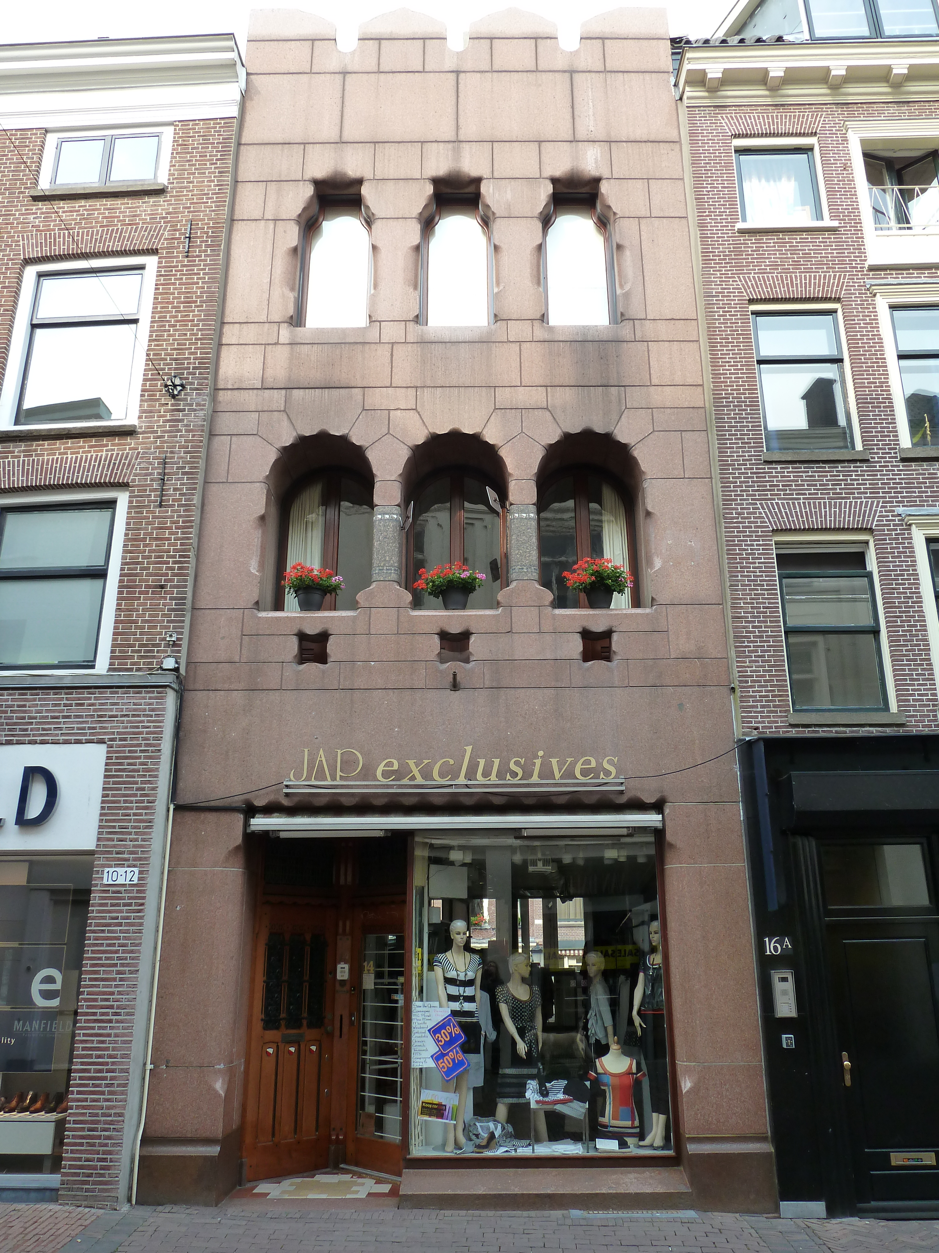 Choorstraat 14, Utrecht, NL. Rijksmonument F. Staal en A.J. Kropholler met sterk naar de Moorse bouwstijl verwijzende elementen."